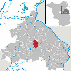 Märkische Höhe in Brandenburg (Country) - District Märkisch-Oderland